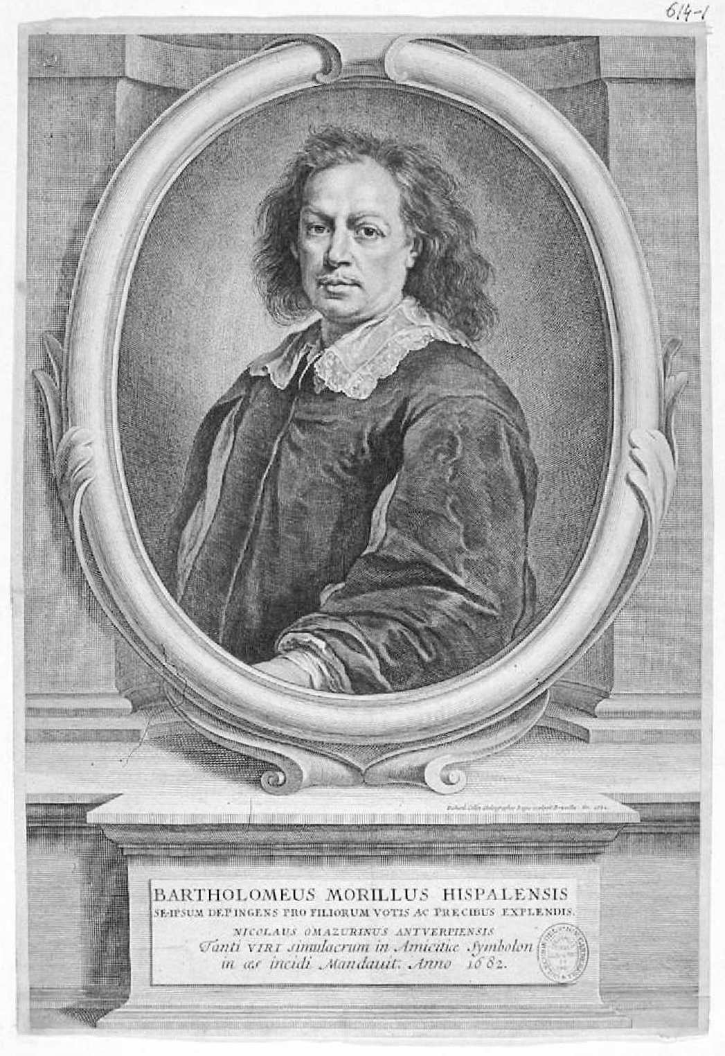 Retrato de Bartolomé Esteban Murillo, firmado "Richard Collin Chalcographus Regis sculpsit Bruxellaæ". Inscripción: "BARTHOLOMEUS MORILLUS HISPALENSIS / SE -IPSUM DEPINGENS PRO FILIORUM VOTIS AC PRECIBUS EXPLENDIS. / NICOLAUS OMAZURINUS ANTVERPIENSIS / Tanti VIRI simulacrum in Amicitiæ Symbolon / in æs incidi Mandauit. Anno 1682" Madrid, Biblioteca Nacional de España